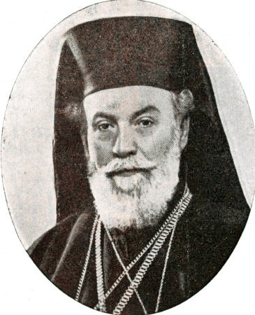 Патриарх Александрийский Николай (Евангелидис)